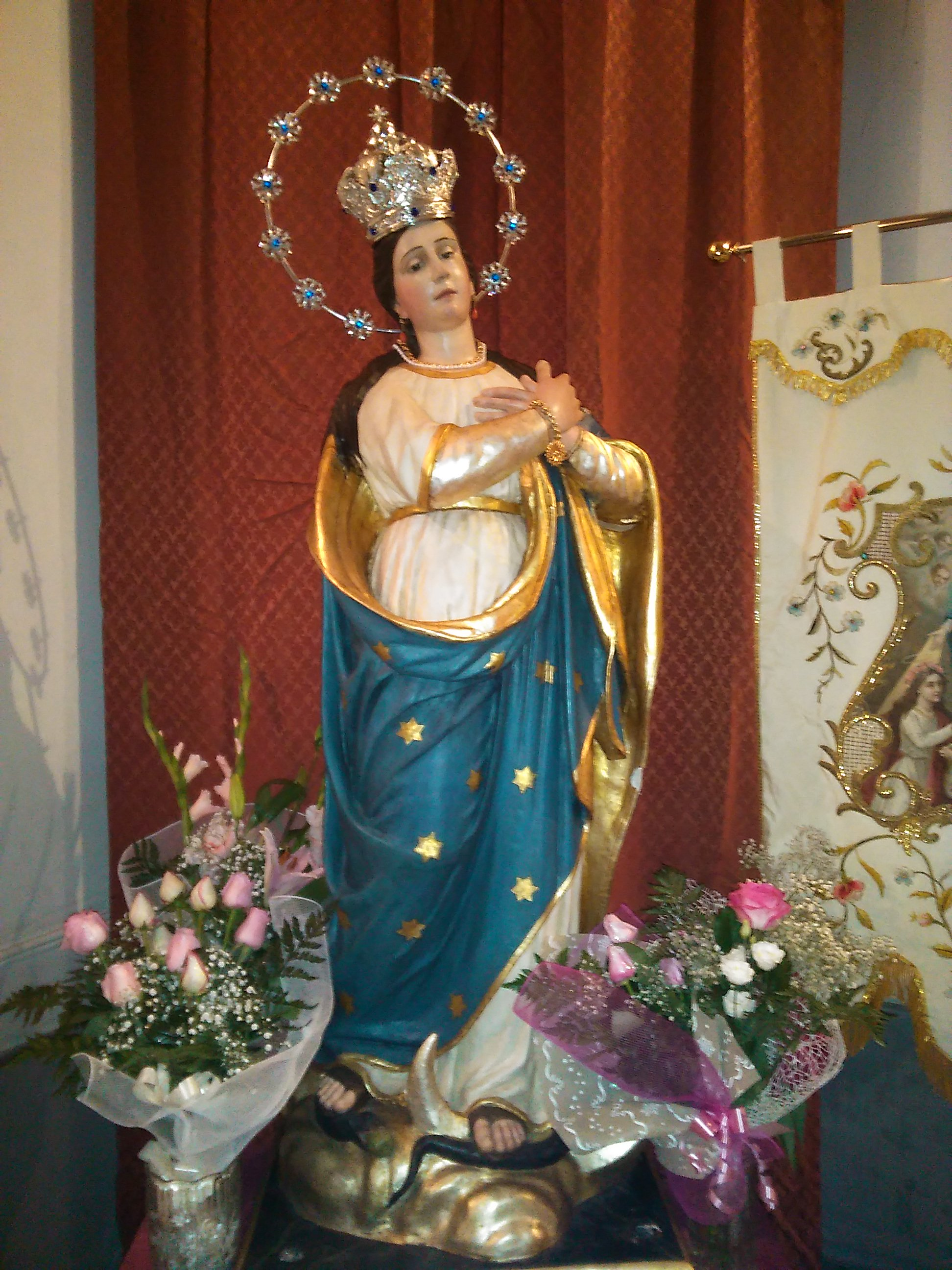 il simualcro dell'Immacolata, opera ligena del 1754 dello scultore Francesco Lo Turco